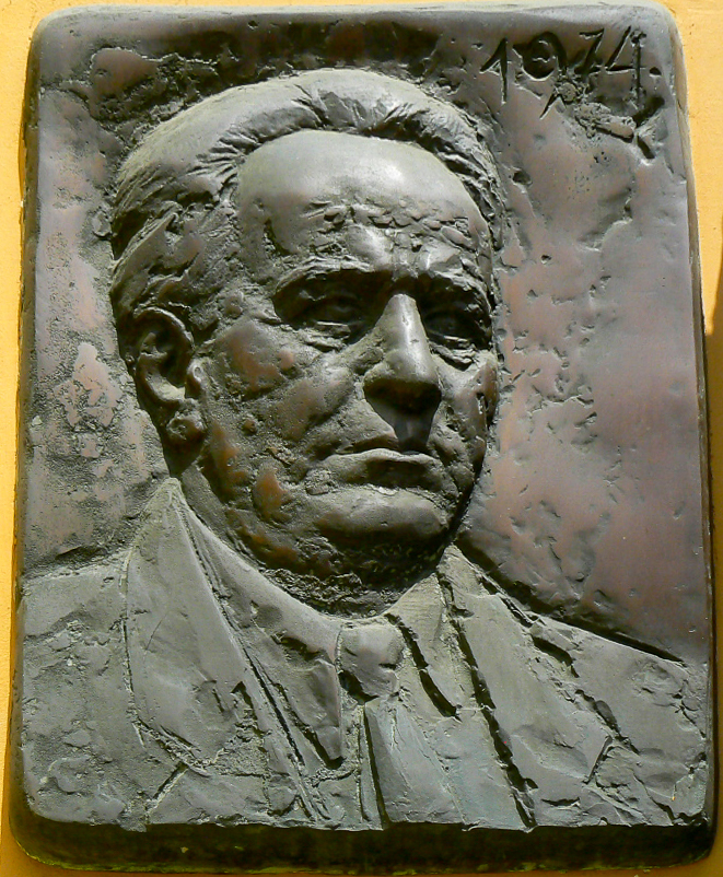 Tóth Sándor: Balázs Béla bronz portréja